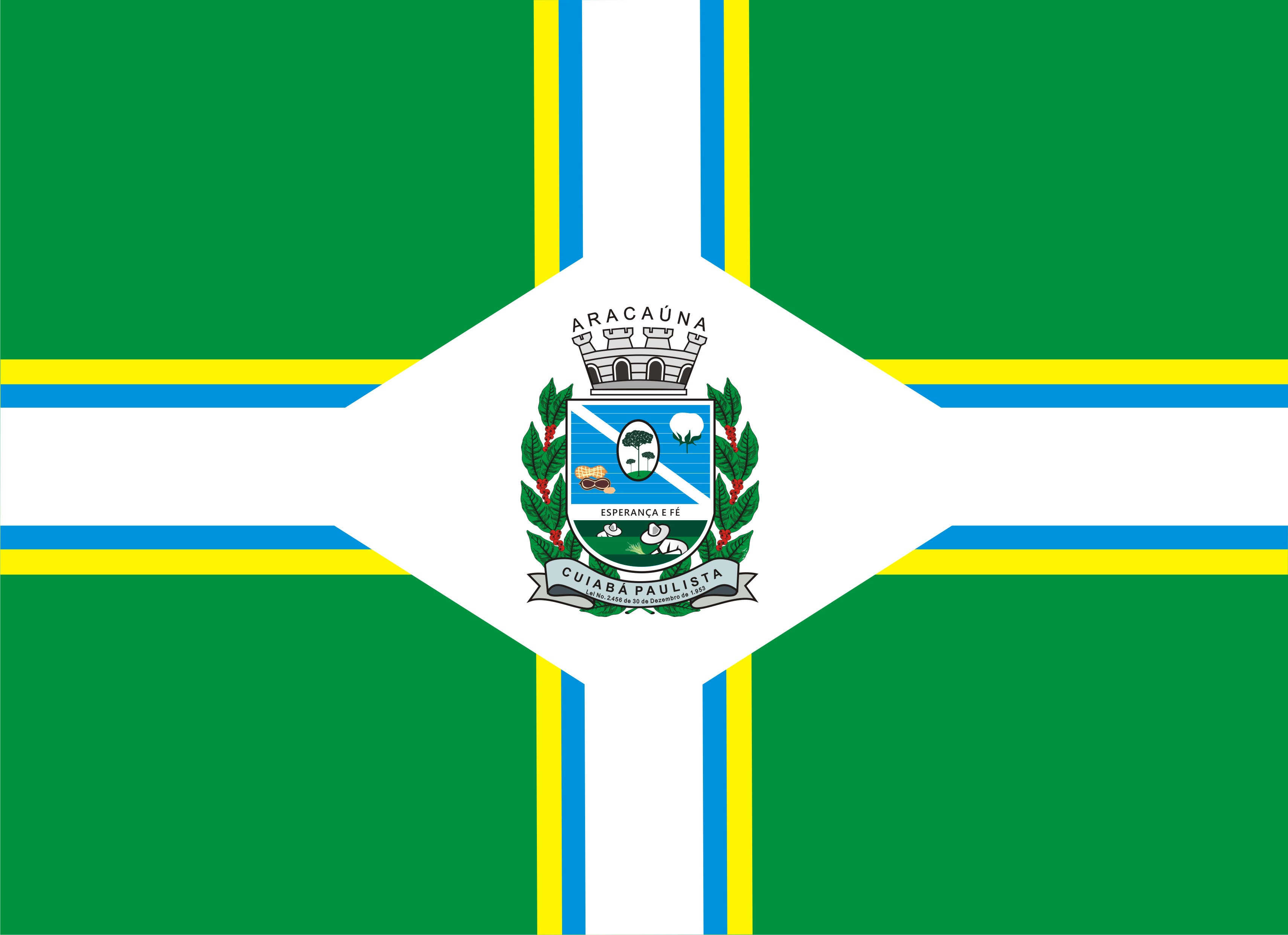 O Brasão e Bandeira do distrito de Cuiabá Paulista, Município de Mirante do Paranapanema, Estado de São Paulo, foi instituído pela Lei Nº 2.405, de 07 de novembro de 2.017, por meio do projeto de lei 65/2017 do vereador Aparecido de Souza Santana. O Brasão e Bandeira de Cuiabá Paulista foram criados e idealizados pelo publicitário William Tadioto de Gouvêa de Presidente Prudente-SP e o Jornalista Elias Gonçalves da Rocha do Distrito de Cuiabá Paulista. Abaixo é descrito o significado dos ícones e símbolos presentes no Brasão e Bandeira de Cuiabá Paulista.